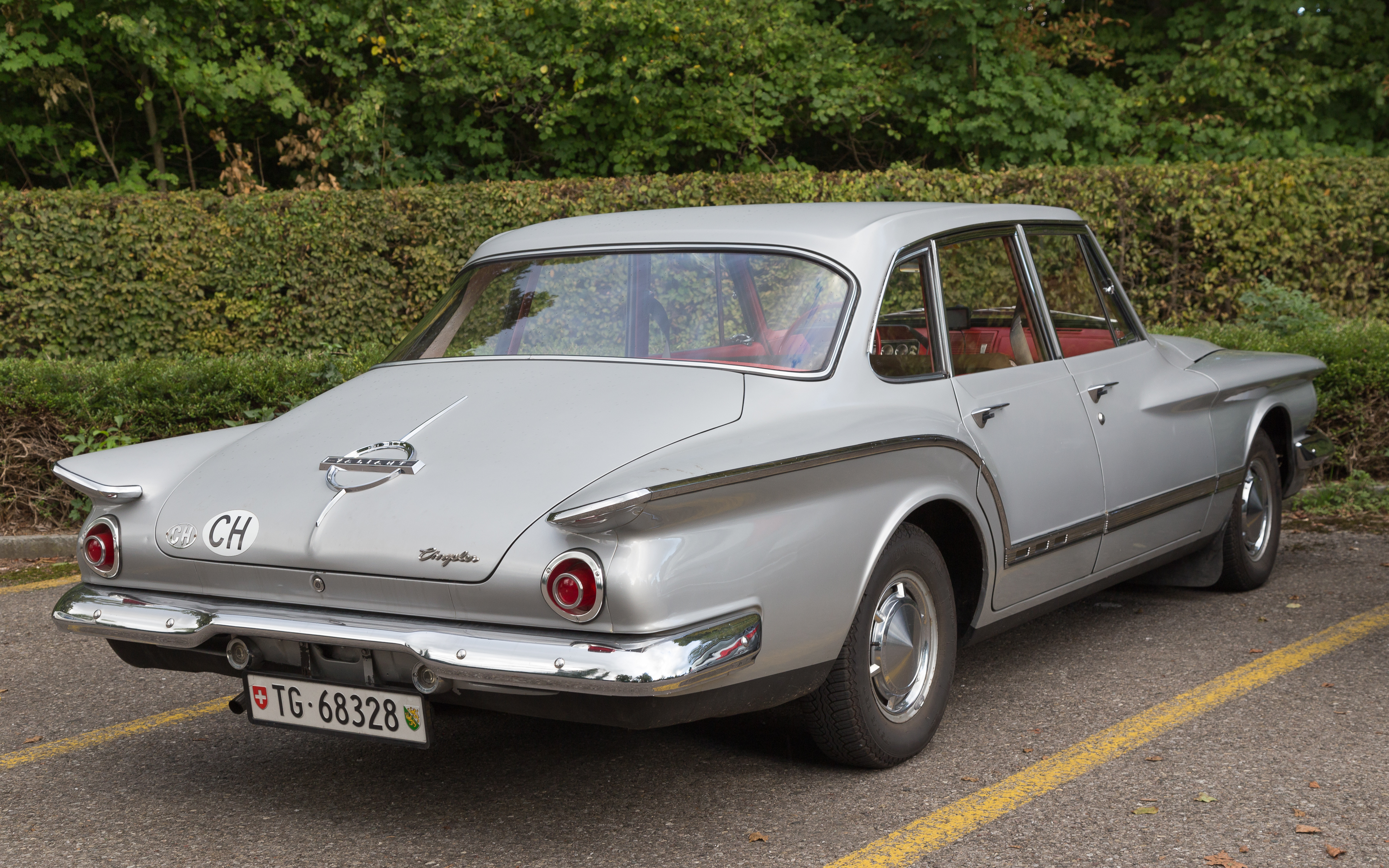 Chrysler Valiant Montage Suisse, gebaut in Schinznach AG